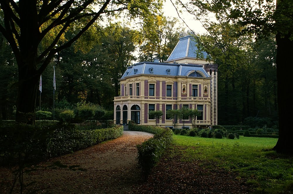 Huize Groot Spriel te Putten.